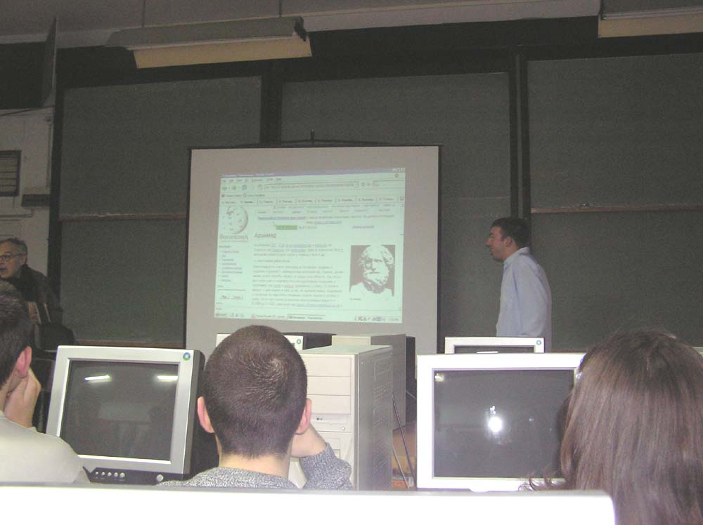 Serbian meetup picture.